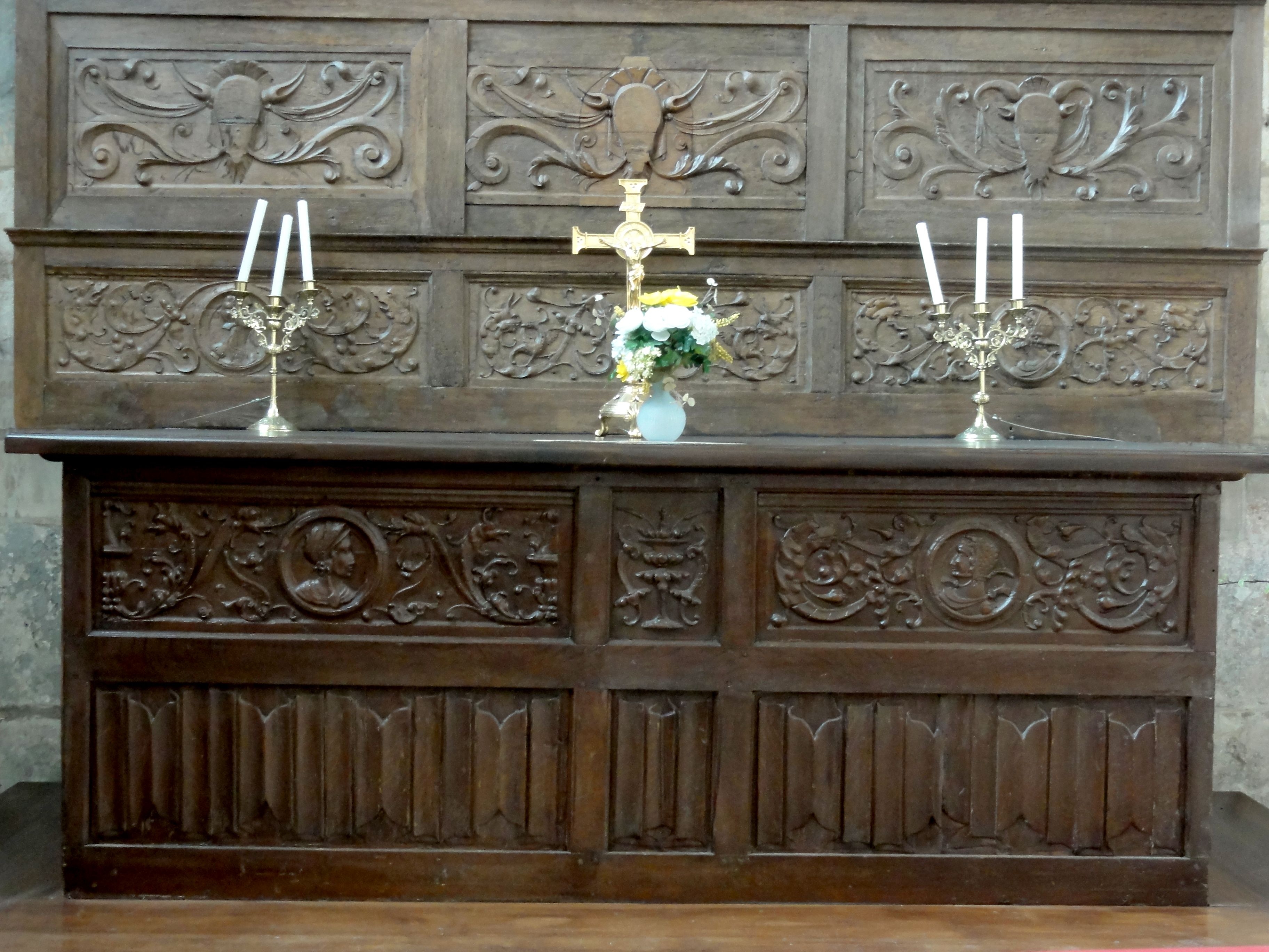 Autel de sainte Marthe.